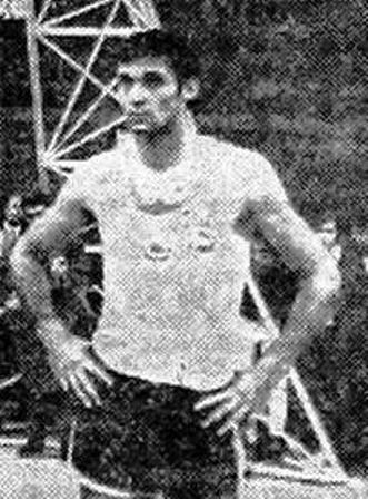 Petar Skansi (born 23 November 1943) is a Croatian former basketball player and coach.